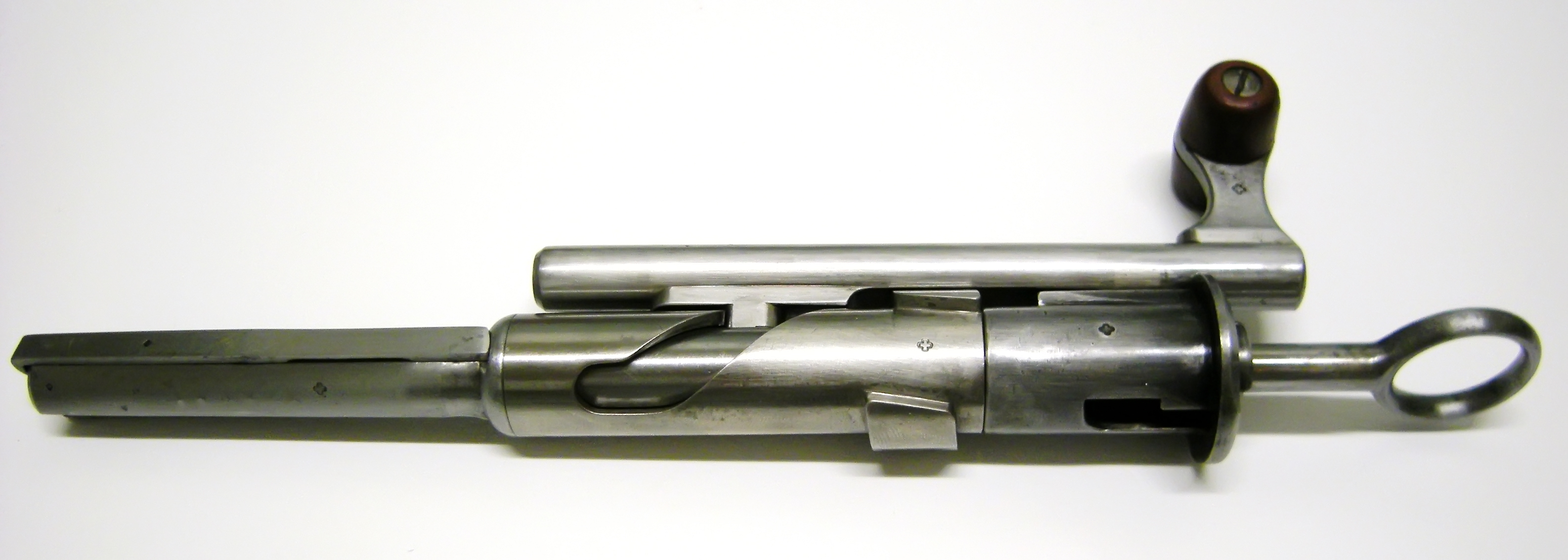 Culasse du fusil suisse à répétition Modèle 1889